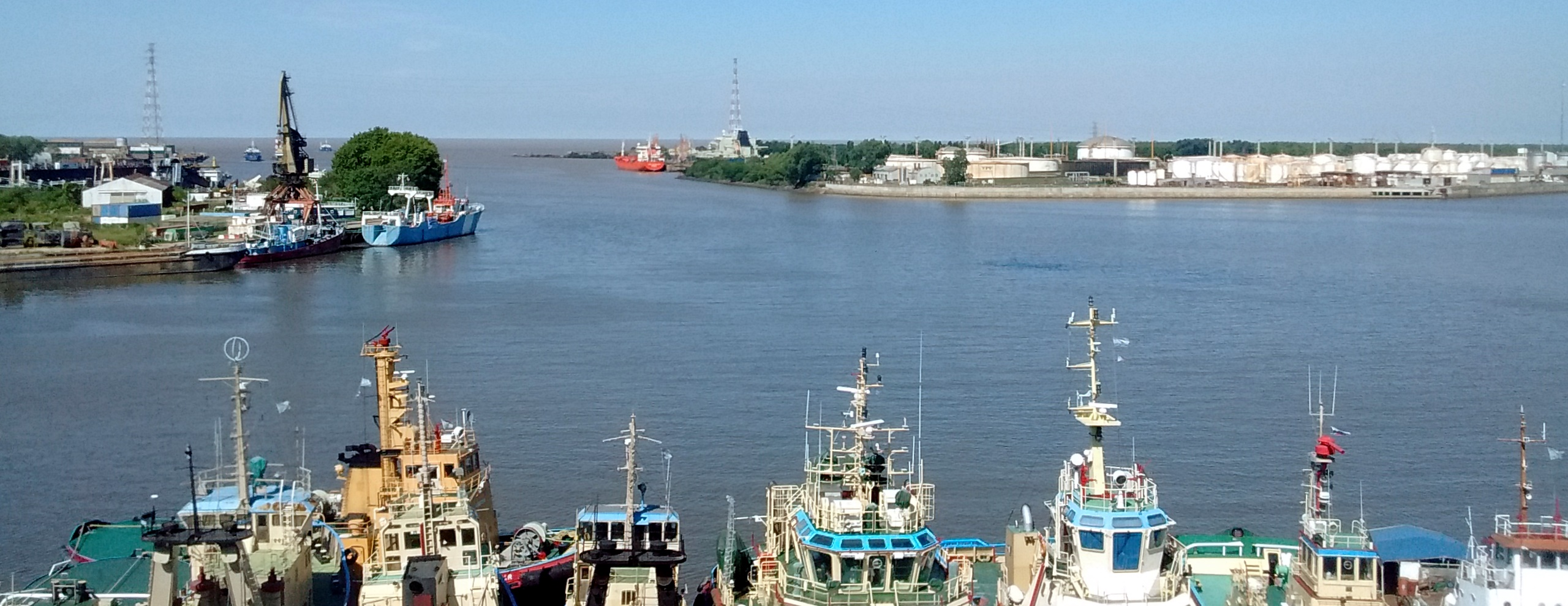 Autopista Doctor Ricardo Balbín, popularmente conocida como Autopista Buenos Aires - La Plata. Vista, entre las calles Brandsen y Suárez, del la boca del Riachuelo. Barrio de la Boca, Buenos Aires, Argentina.